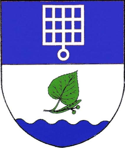 znak, Vlkov, okres Žďár nad Sázavou